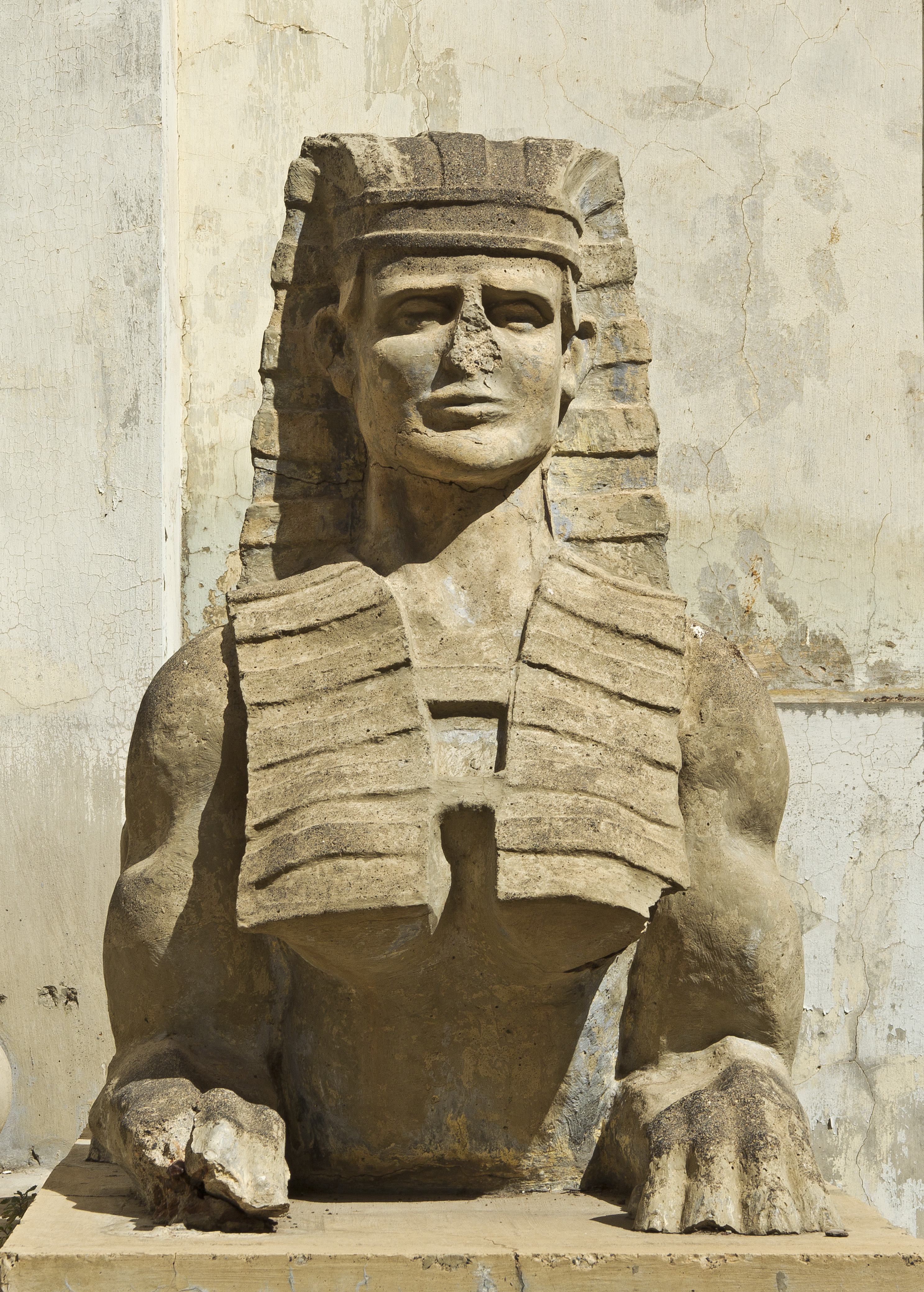 Sphinx vor dem „Templo Masónico“ in Santa Cruz de Tenerife